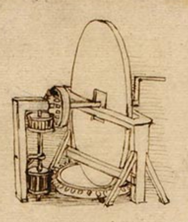 Leonardo da Vinci, design for a machine for grinding convex lenses